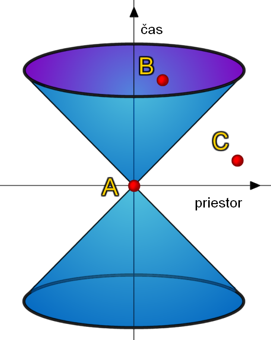 slovenská verzia Image:Light cone.png